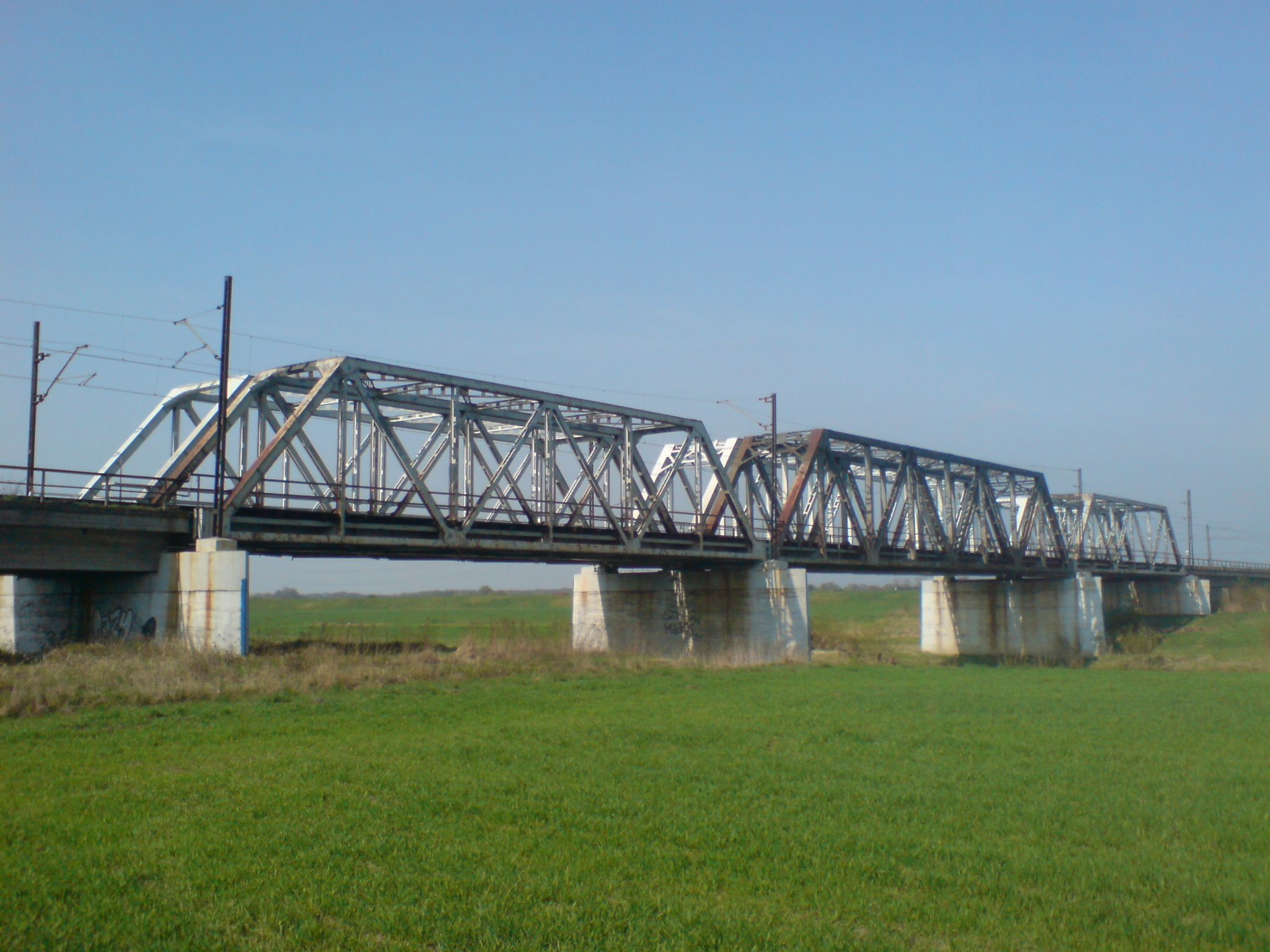 Most kolejowy na kanale Ulga w Raciborzu